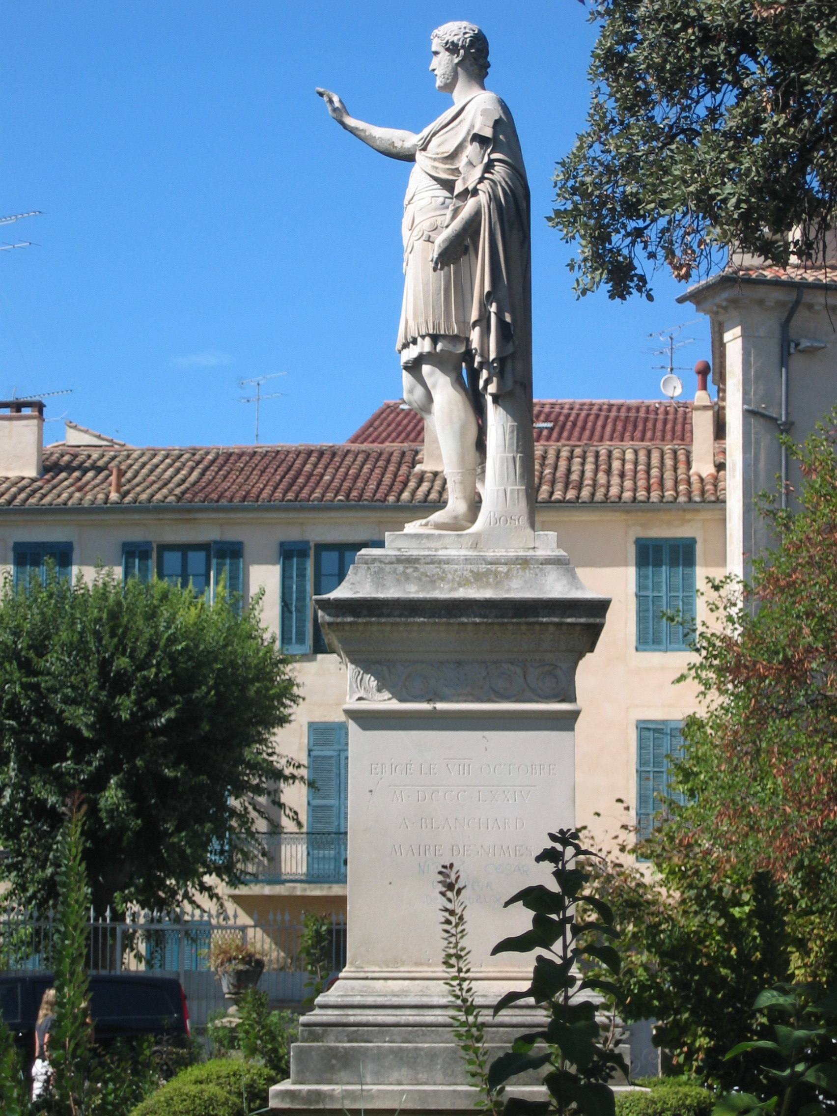 Statue d'Antonin, photo personnelle de Nicolas Cadène